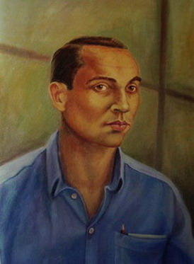 Título:El lápiz de Miguel. Óleo de Ramón Fernández Palmeral. 46 x 61 cm.